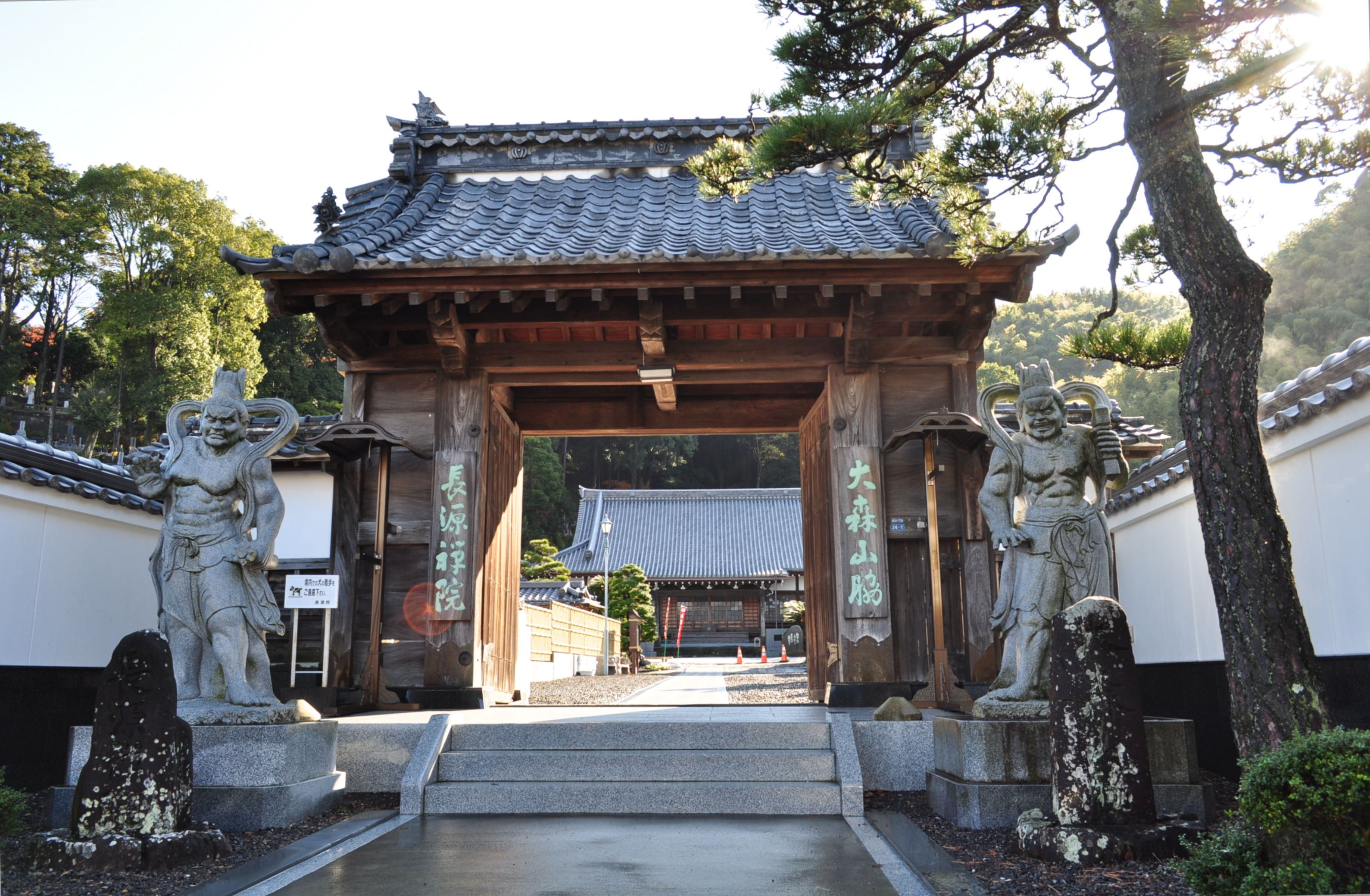 大森山長源院の山門。